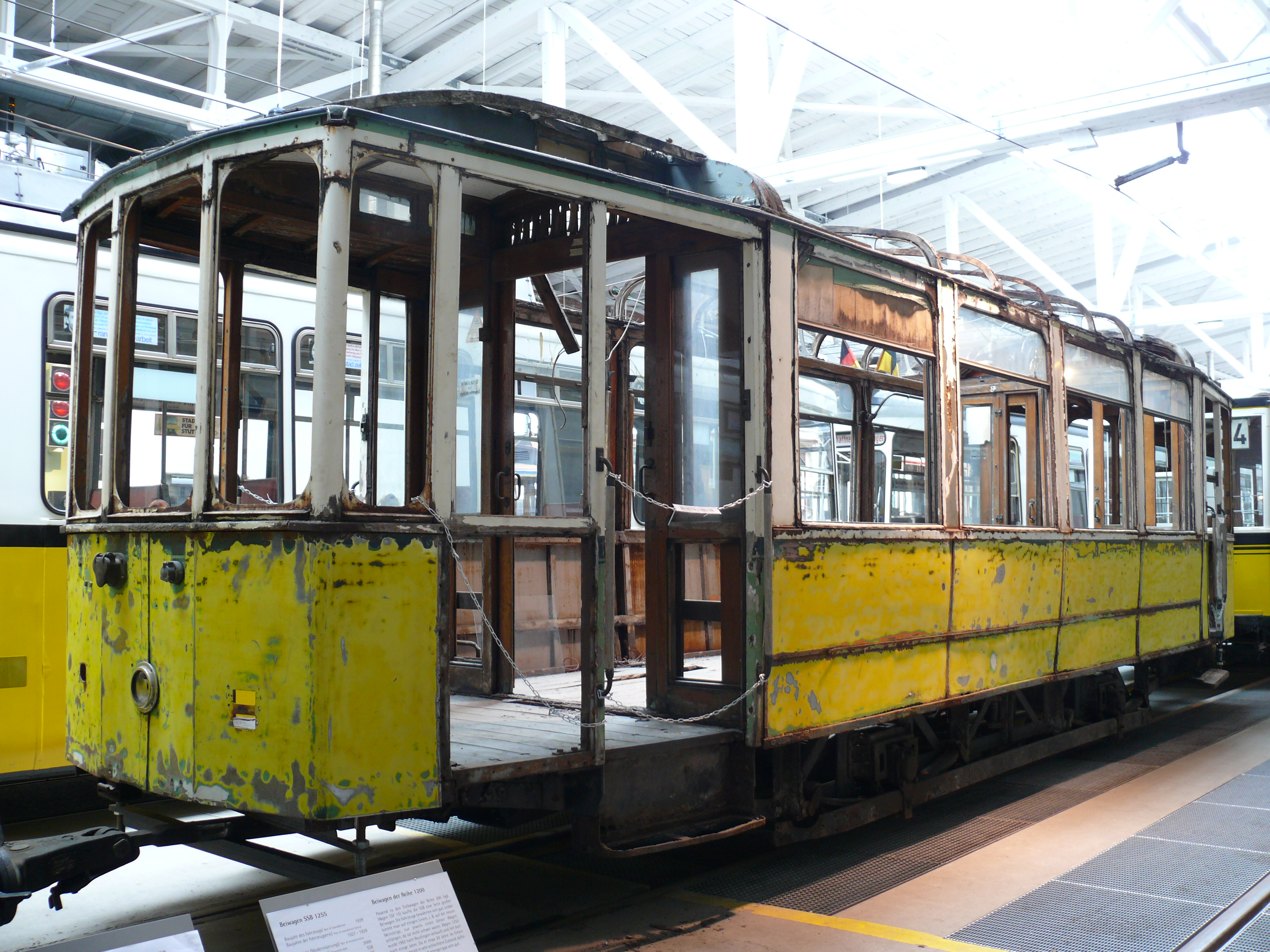 Beiwagen 1255 der SSB im Stuttgarter Straßenbahnmuseum.